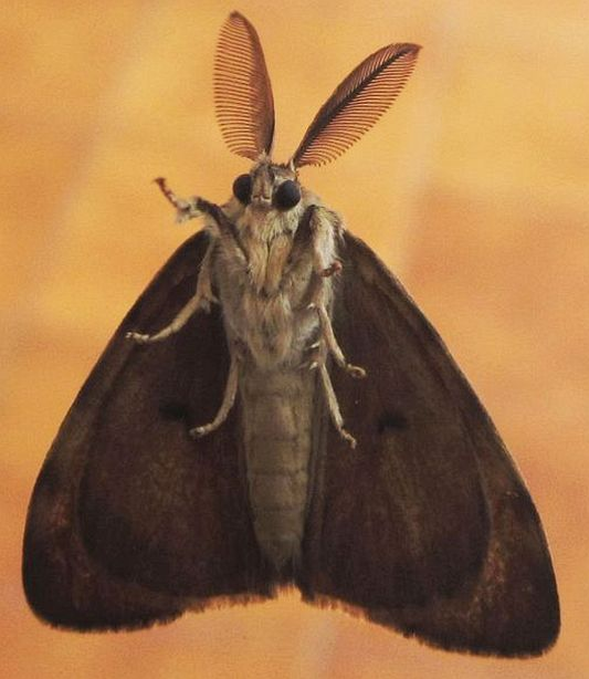 Vista ventral d'una lymantria dispar o cuca peluda del suro